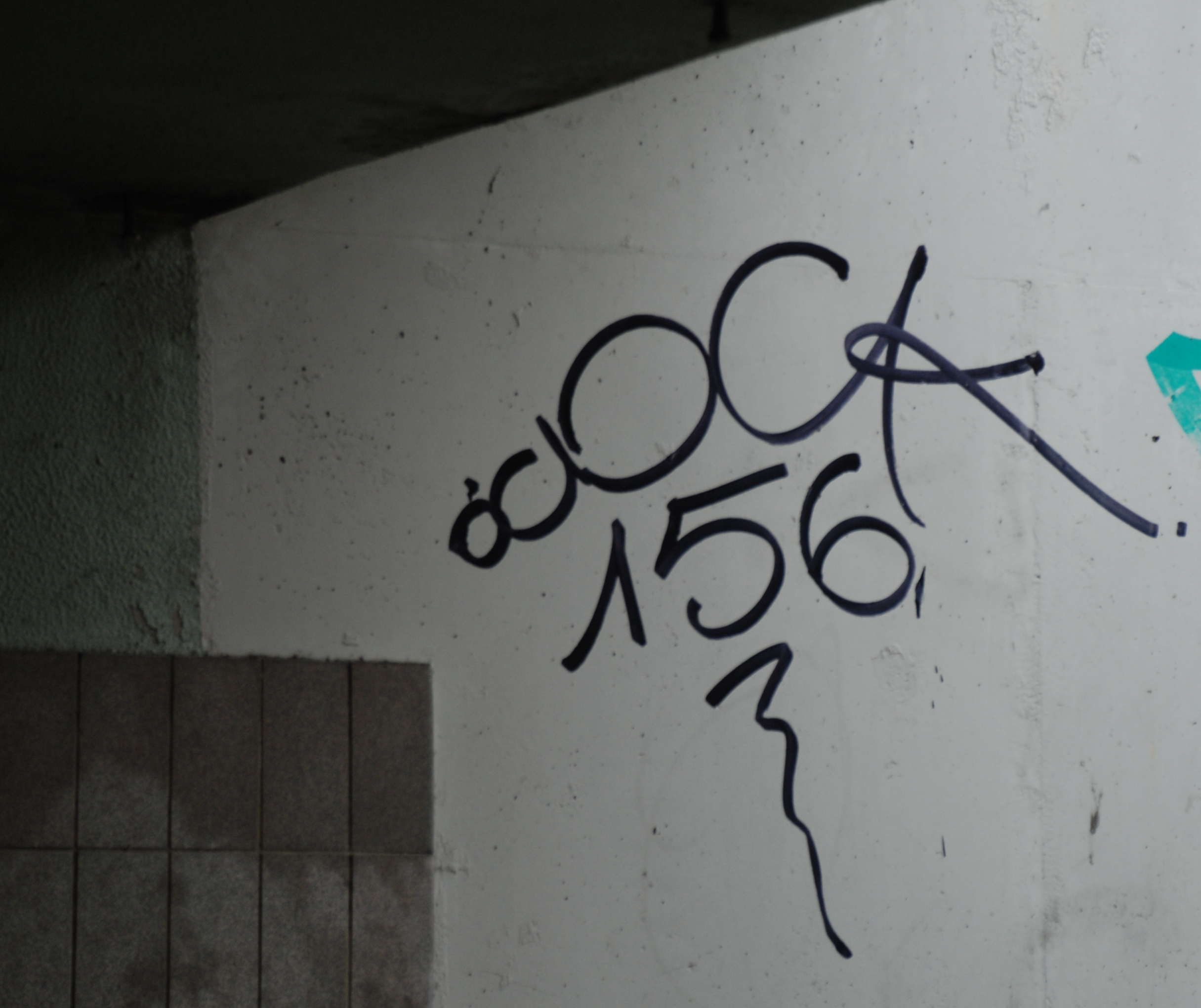 Tag de O'Clock dans le tunel de la guare namuroise.